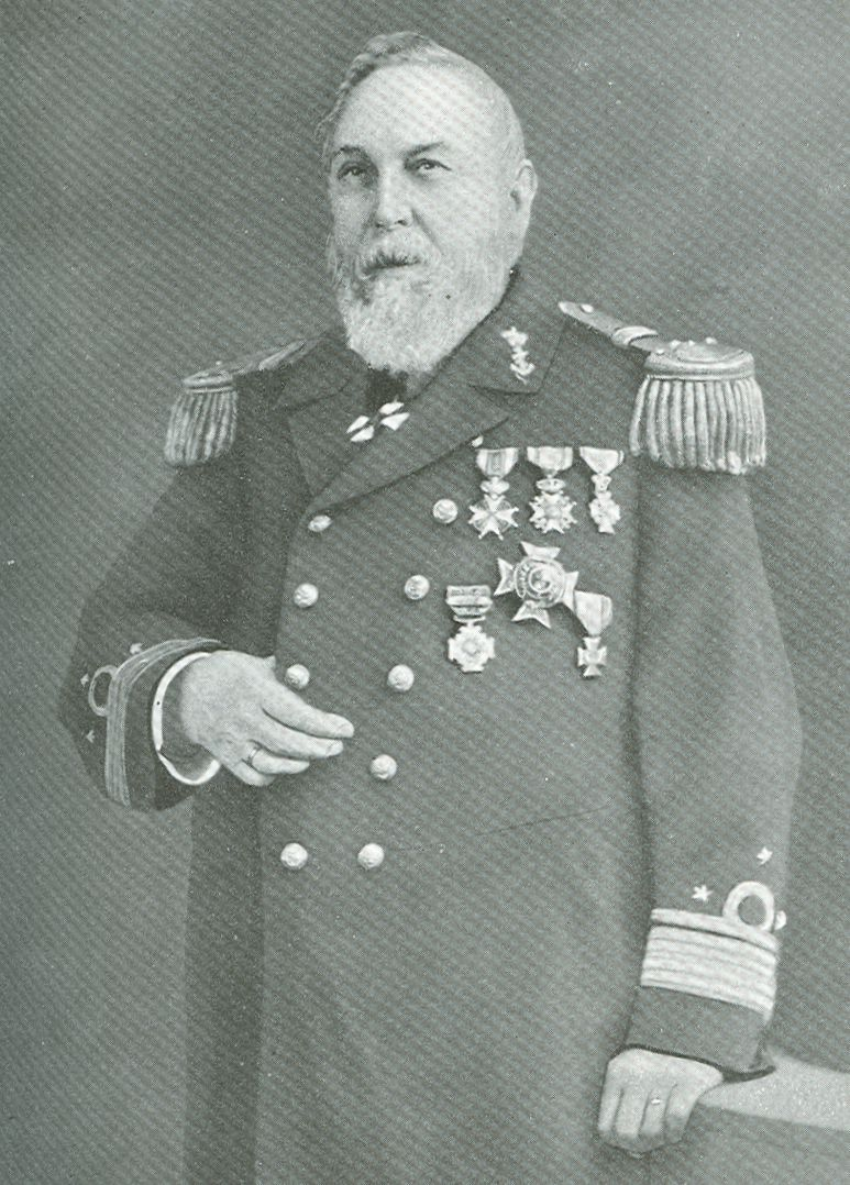 portretfoto van Vice-admiraal Gregory